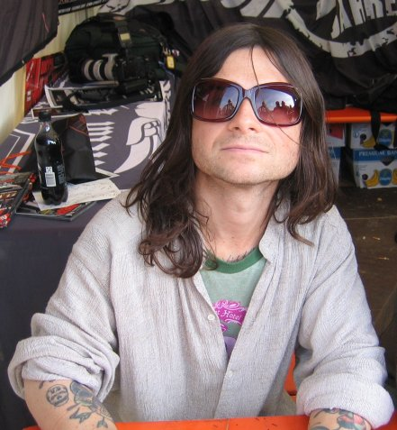 Sänger Keith Caputo bei einer Autogrammstunde auf dem Summer Breeze-Festival